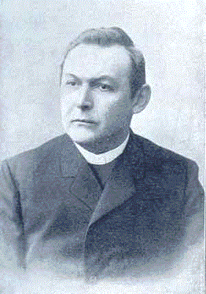 Lorenz Huber (1862-1910), katholischer Priester und Gründerpräses des Süddeutschen Verbands katholischer Arbeitervereine